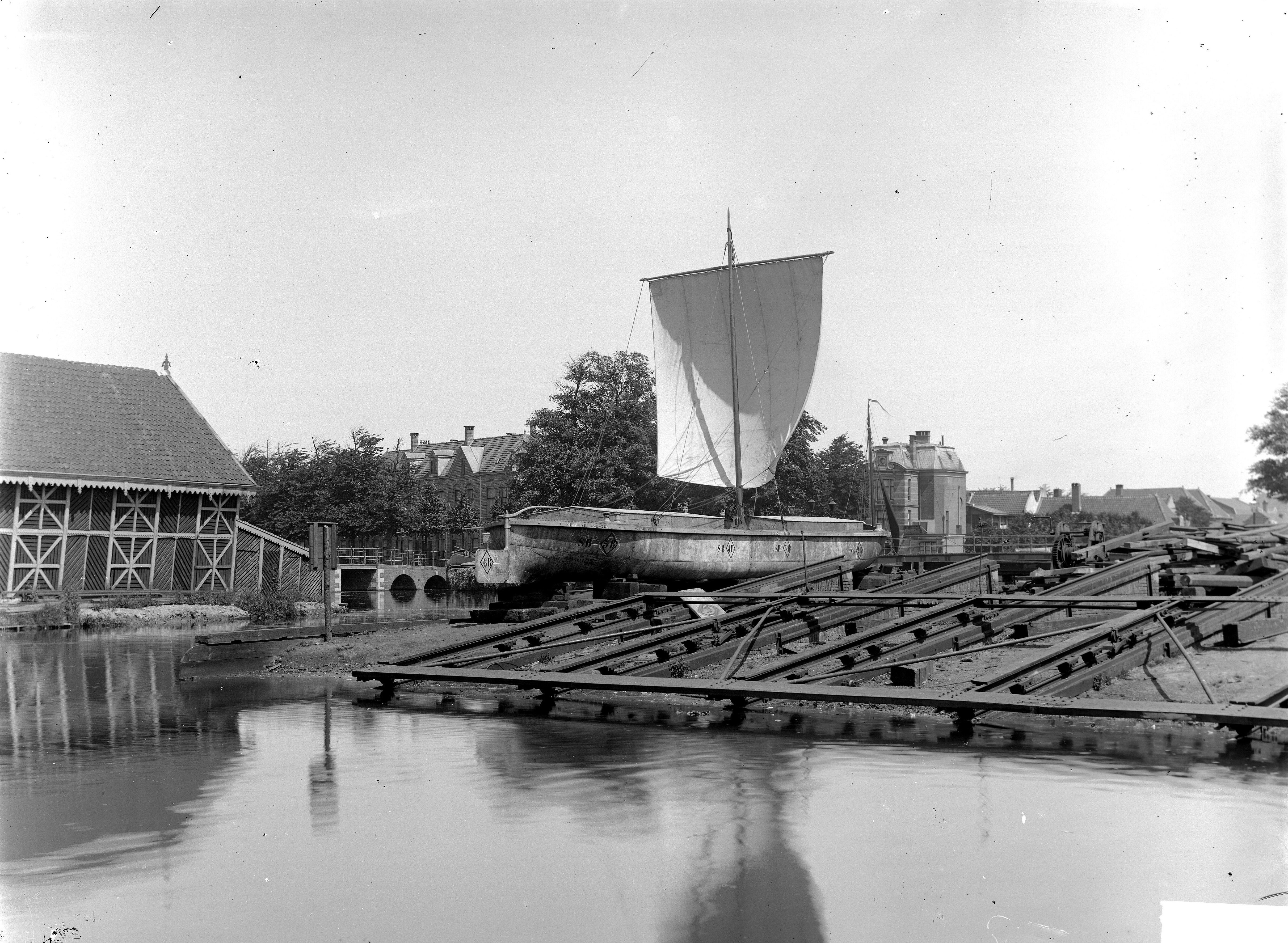 Zuidsingel 66, Koninklijke Nederlandse Grofsmederij. Schip onder zeil op de scheeps/reparatiehelling aan de zijde van de Oude Rijn gezien van de Binnenoostsingel naar de hoek Lage Rijndijk/Herensingel. Links deels de Zijlpoortsbrug te zien. Rechts de Schrijversbrug, deels zichtbaar.